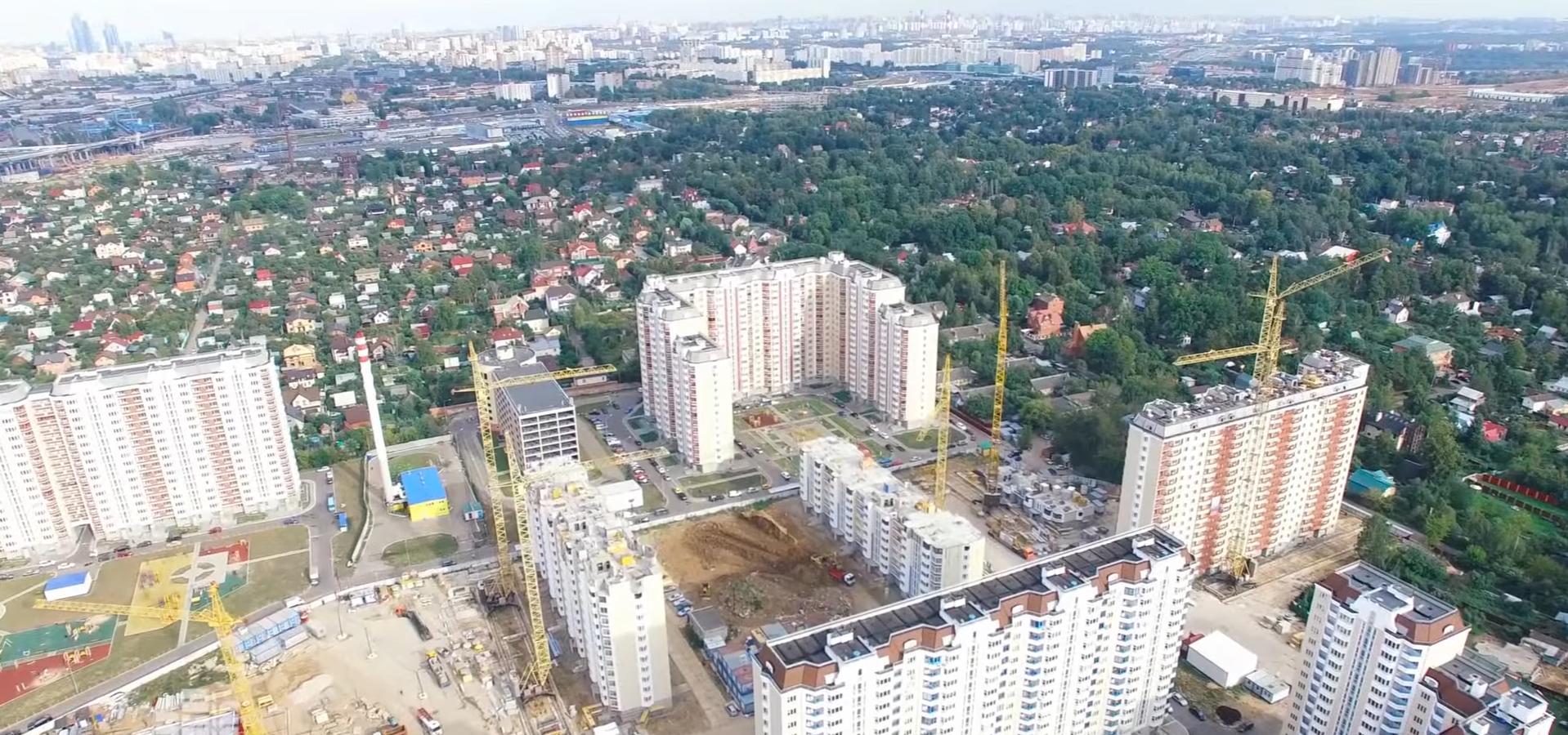 Фотография Немчиновки с высоты птичьего полёта со стороны ул. Советский проспект. Сфотографирован многоэтажный микрорайон, справа за ним стародачное село Немчиновка и слева товарищество Дружба (частные дома).